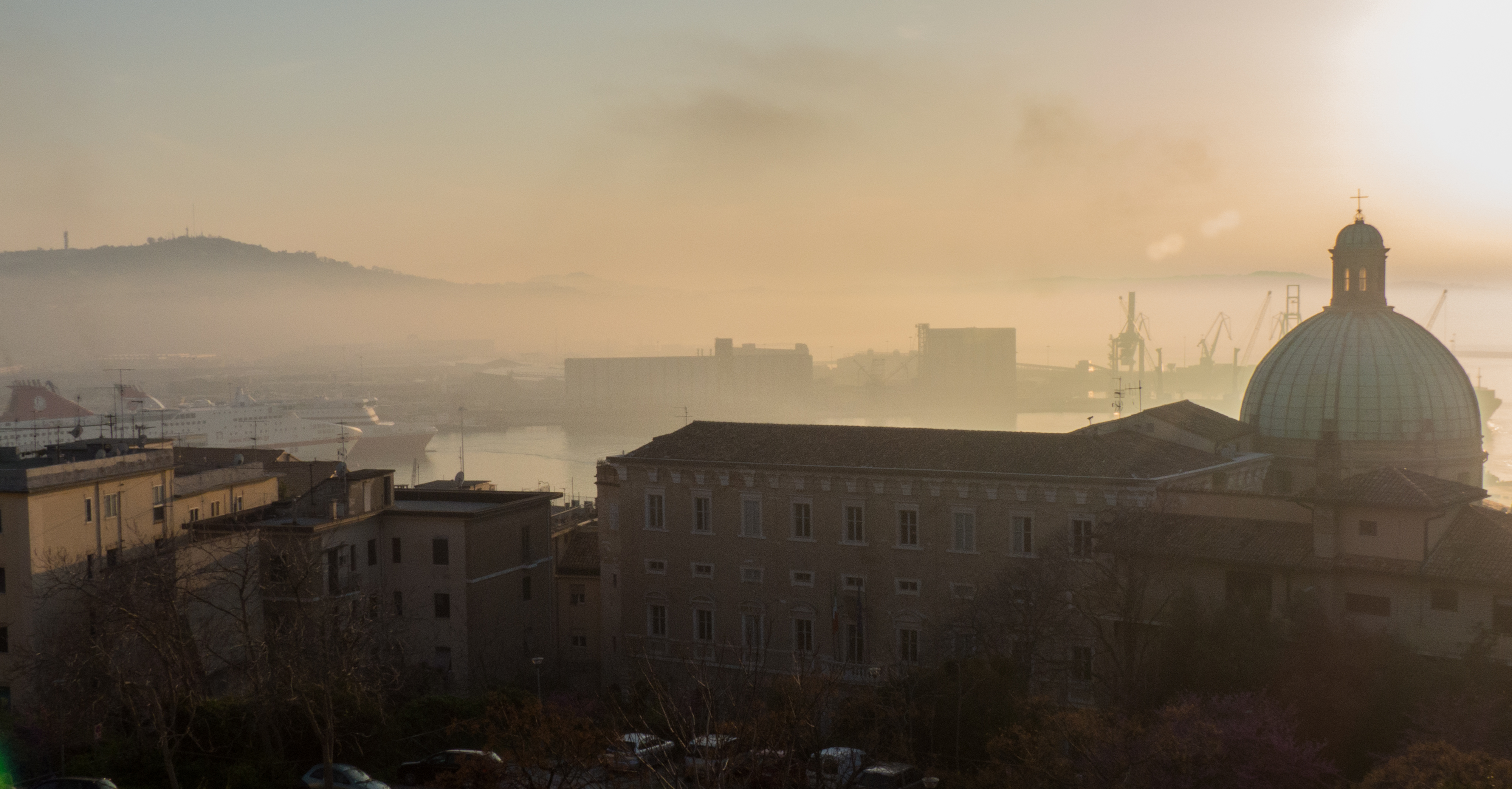 Nebbia al porto di Ancona